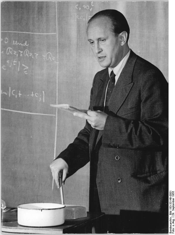 Leipzig, Universität, Professor Turan Zentralbild Bez.Re.Leipzig 3 Mot.29.9.1955 Gastvorlesung von Professor Turan (Ungarn) am mathematischen Institut der Karl-Marx-Universität, Leipzig Aus Ungarn-das in der Welt eine führende Stelle in den mathematischen Wissenschaften einnimmt- kam Professor Turan(Universität Budapest), um im mathematischen Institut der Karl-Marx-Universität zu Leipzig im Kleinen Hörsaal eine Vorlesung zu halten. (27.9.55). UBz: Professor Turan, Universität Budapest,bei einer Vorlesung.